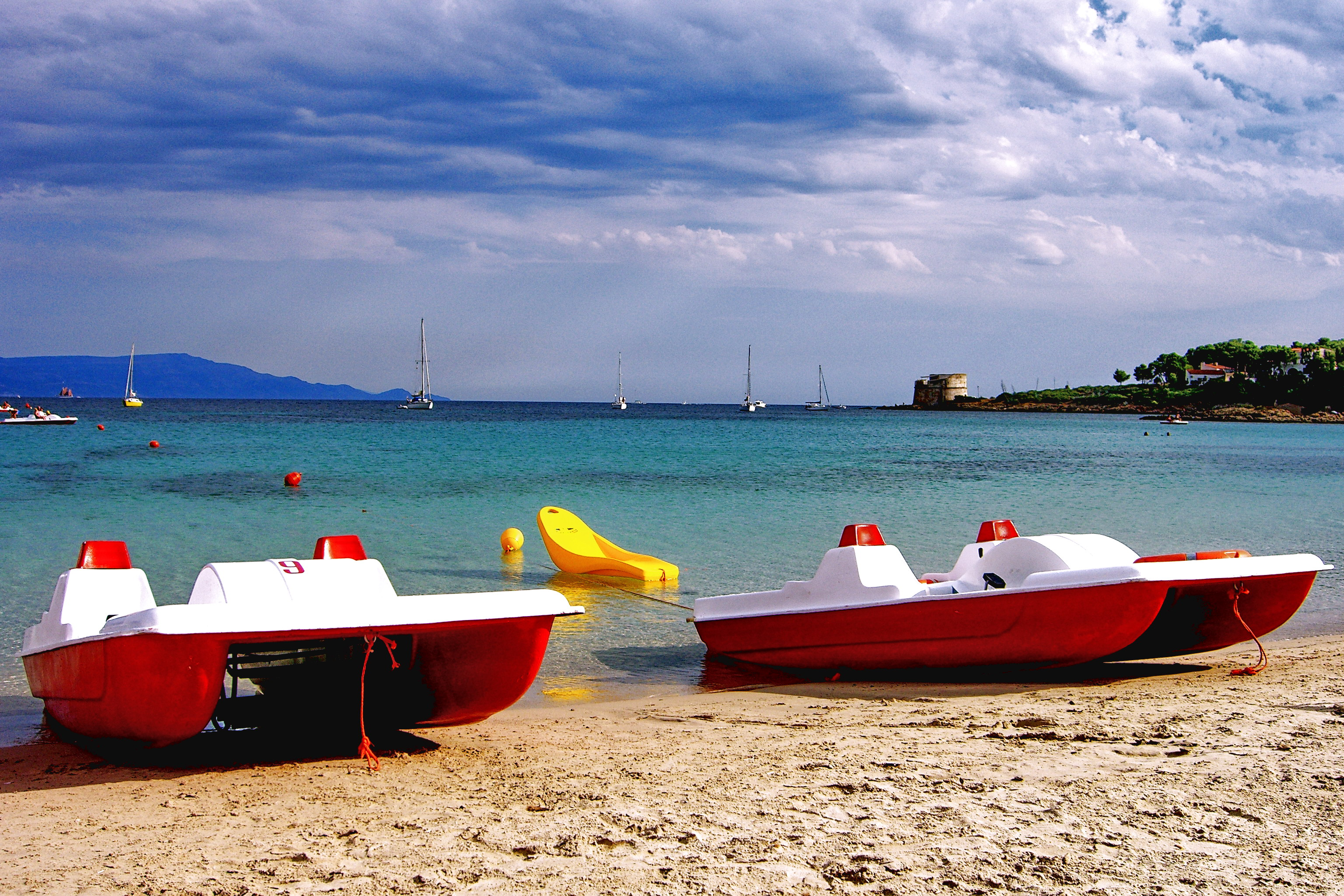 Veduta DX della sipaggia del Lazzareto di Alghero Autore: Alessandro Angotzi Anno: 2006